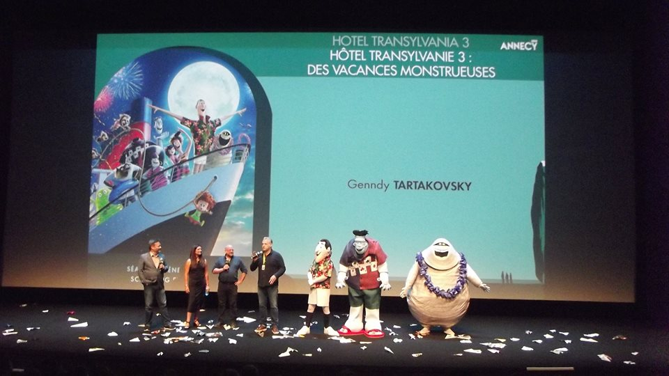 Présentation de Hôtel Transylvanie 3 au festival international du film d'animation d'Annecy 2018.